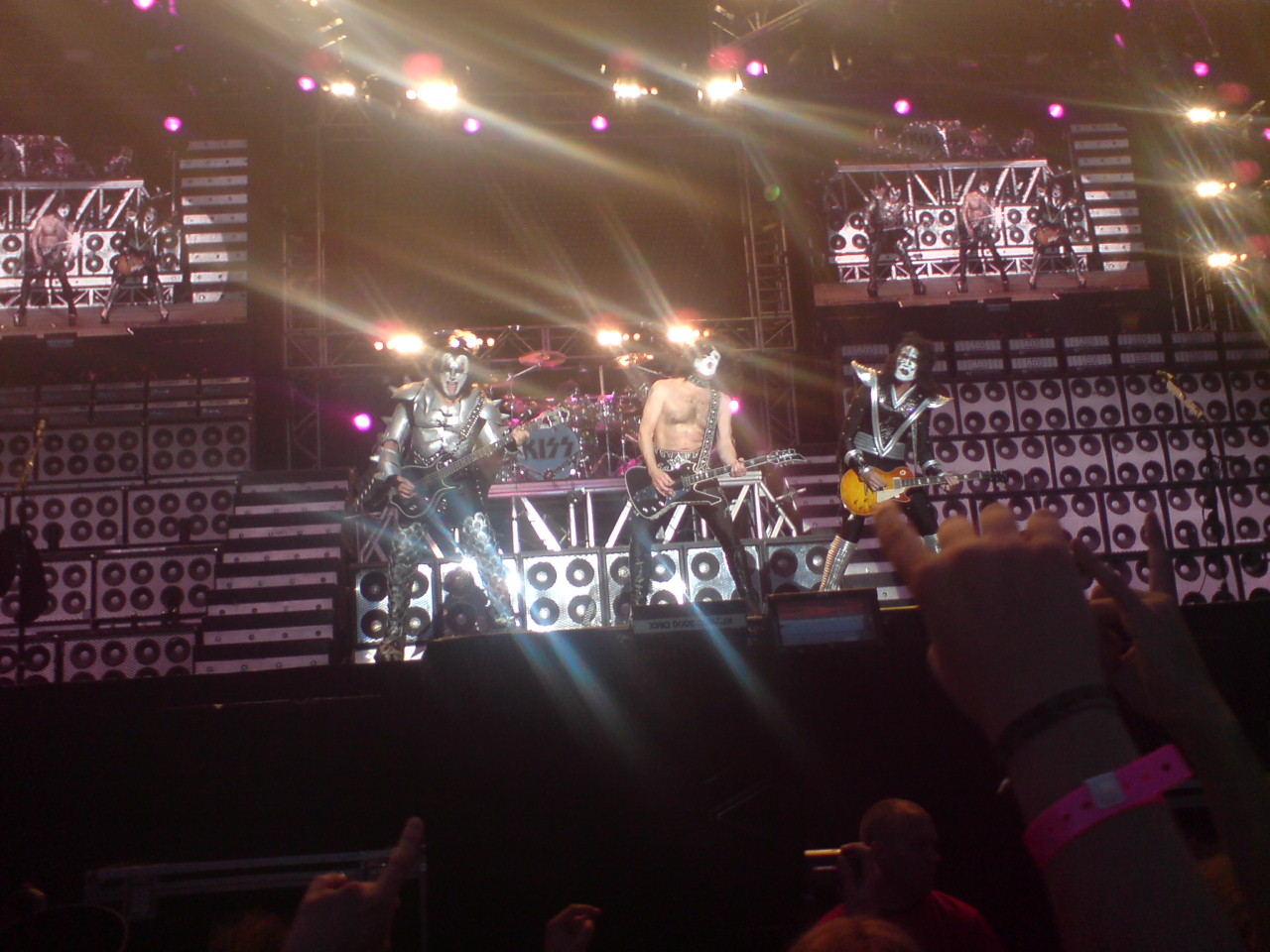 Det här är en bild av Gene Simmons och paul Stanley från bandet KISS. Bilden tog jag själv under deras spelning i Stockholm